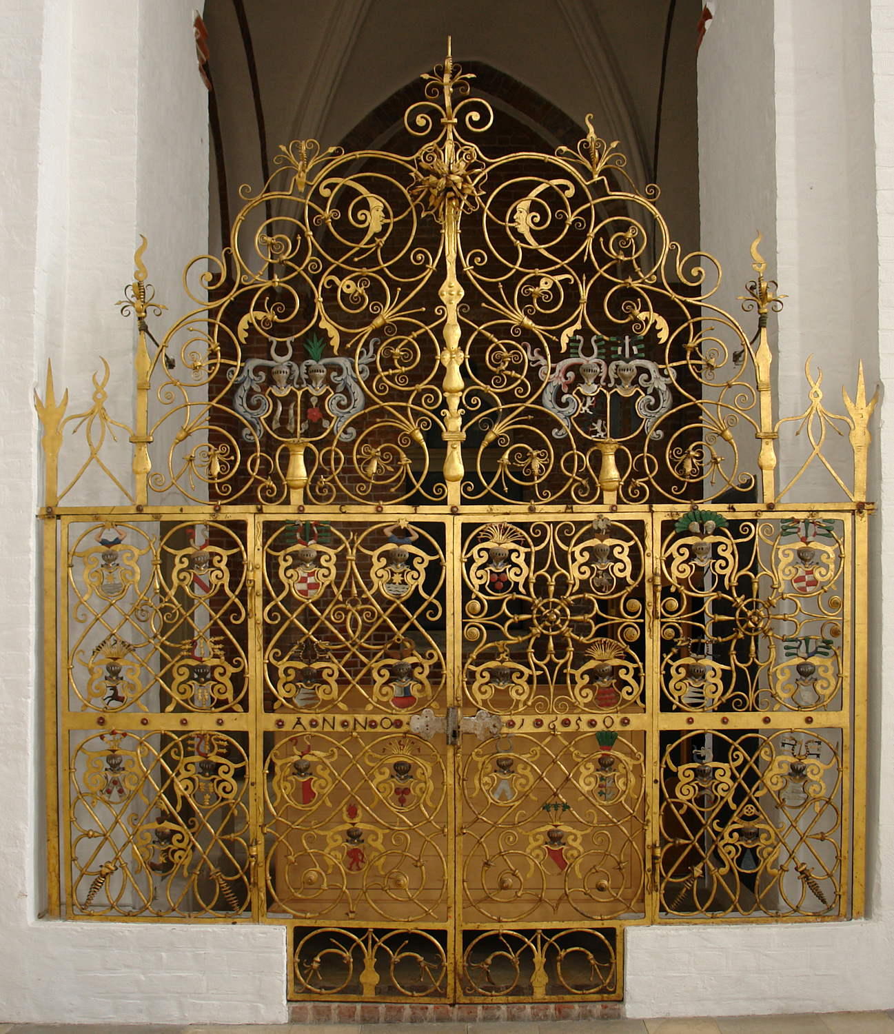 Dom zu Århus: Schmiedeeisernes Gitter-Portal, hergestellt vom deutschen Schmiedemeister Caspar Fincke. Jahreszahl: 1650